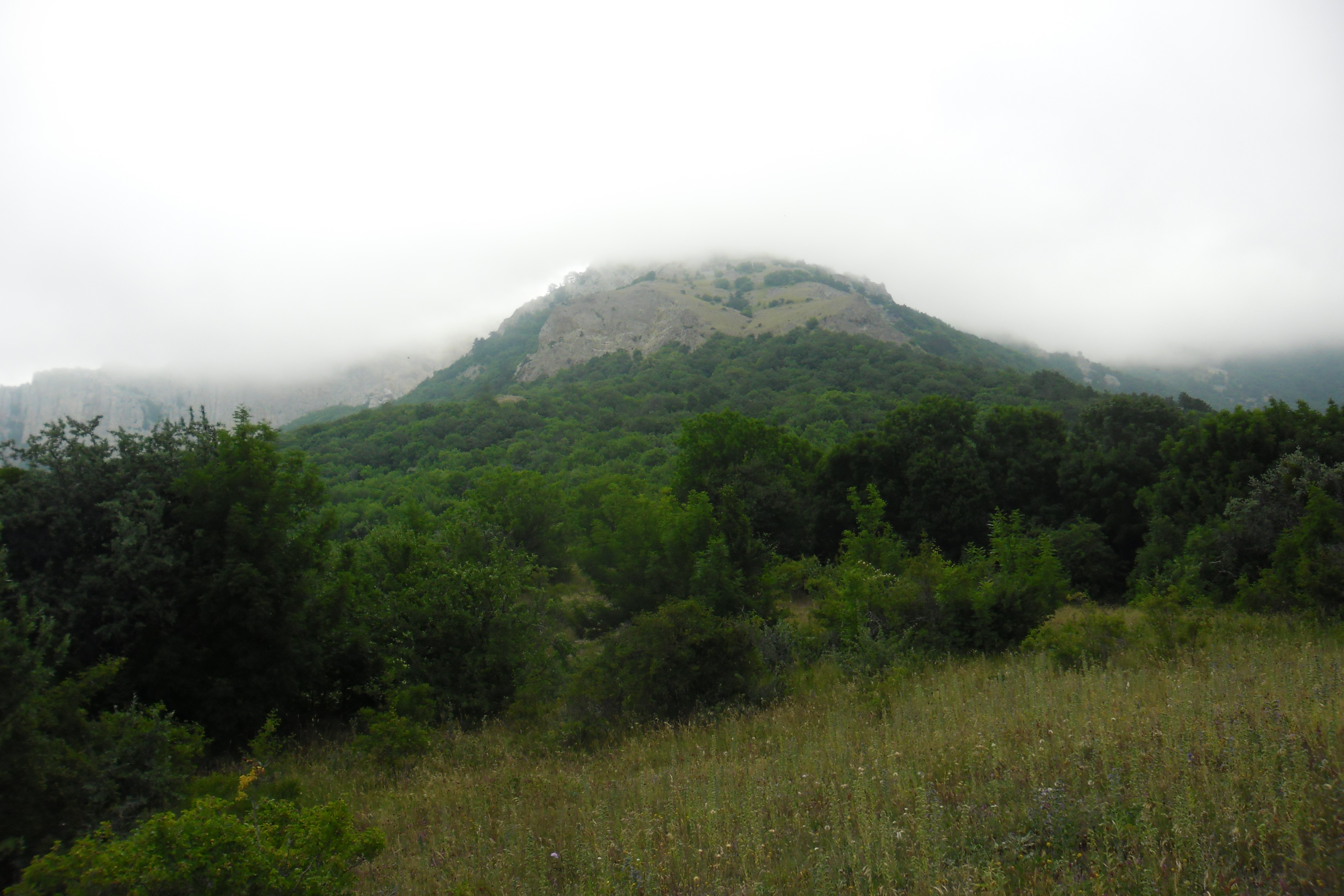 Фото